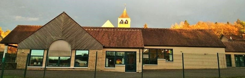 Ecole de Boissy-la-Rivière